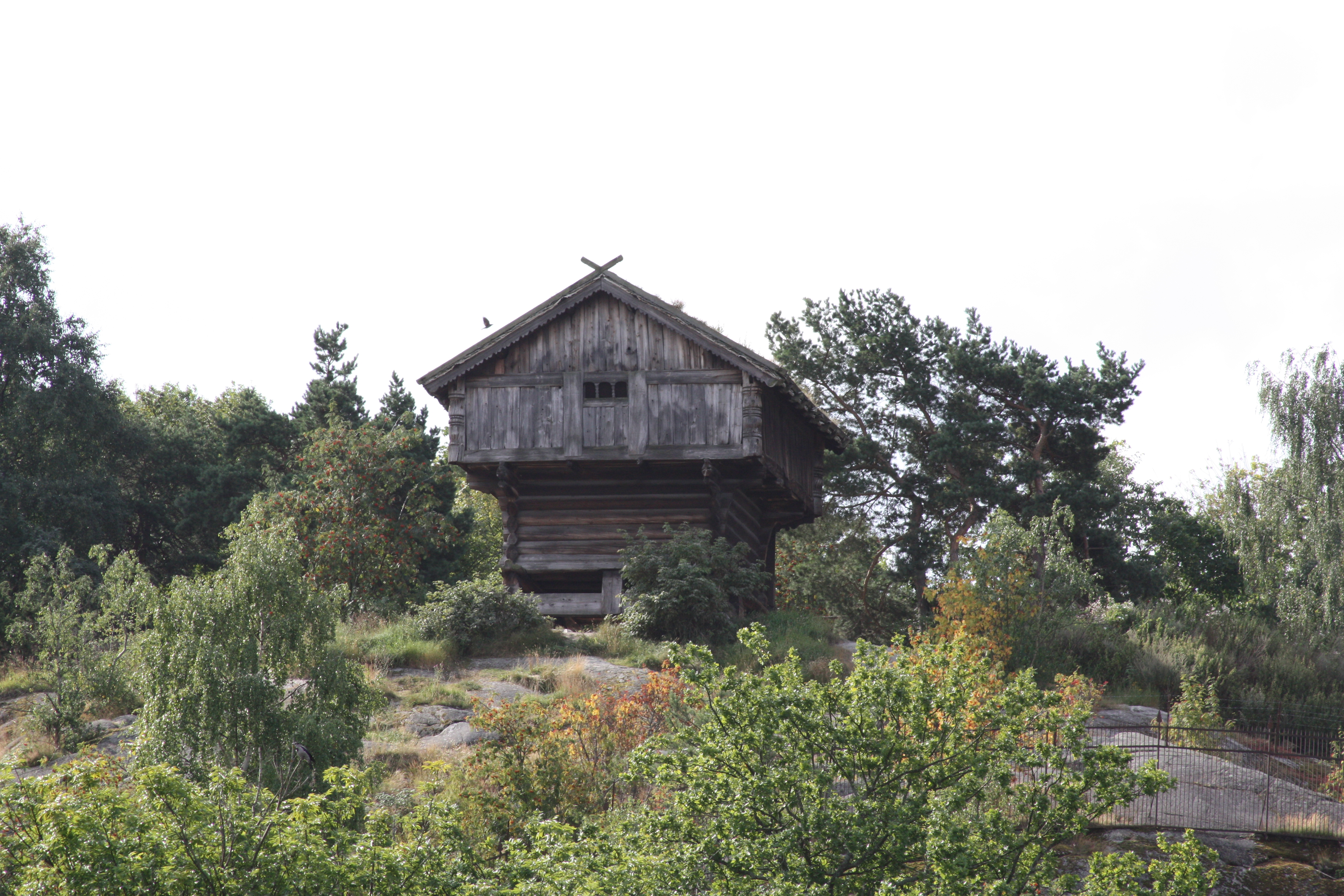 Vastveitloftet, Skansen, Stockholm